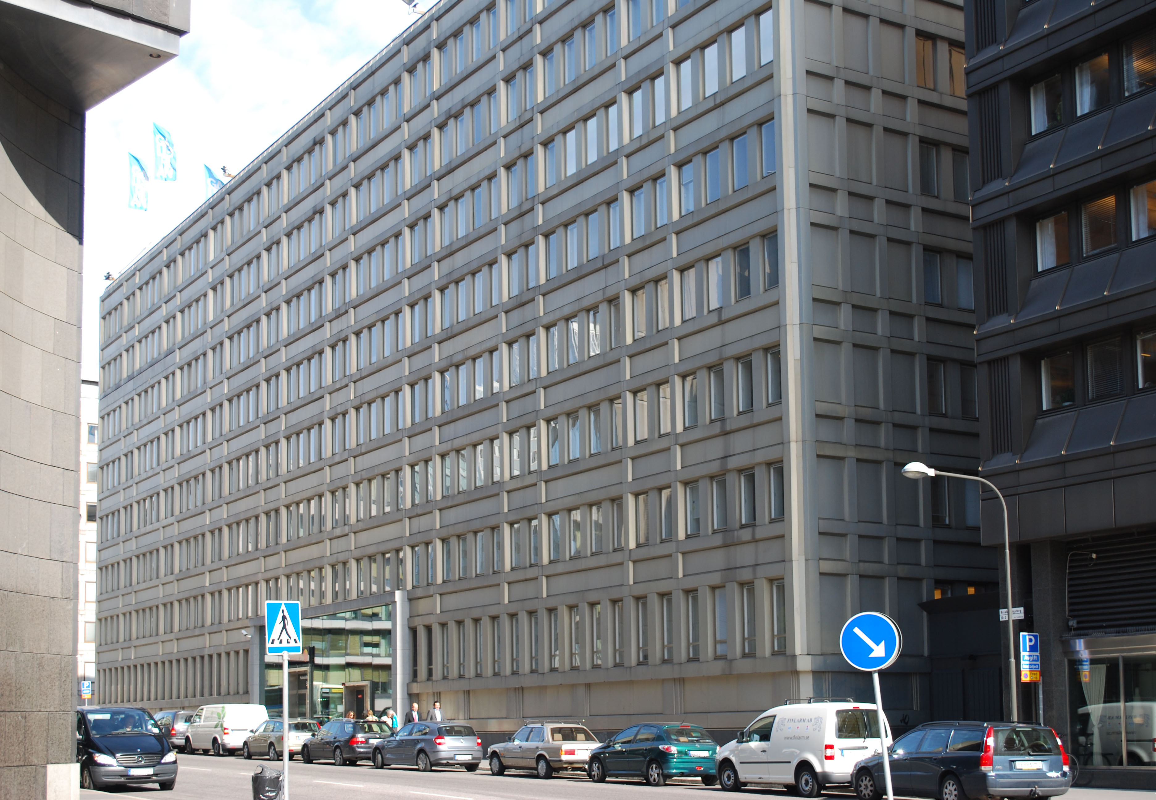 Hus C i gallerian, Malmskillnadsgatan 32 och Hamngatan 37 på Norrmalm i centrala Stockholm. Byggt 1973-75. Arkitekt Boijsen & Efvergren. Byggherre Sveriges Investeringsbank.